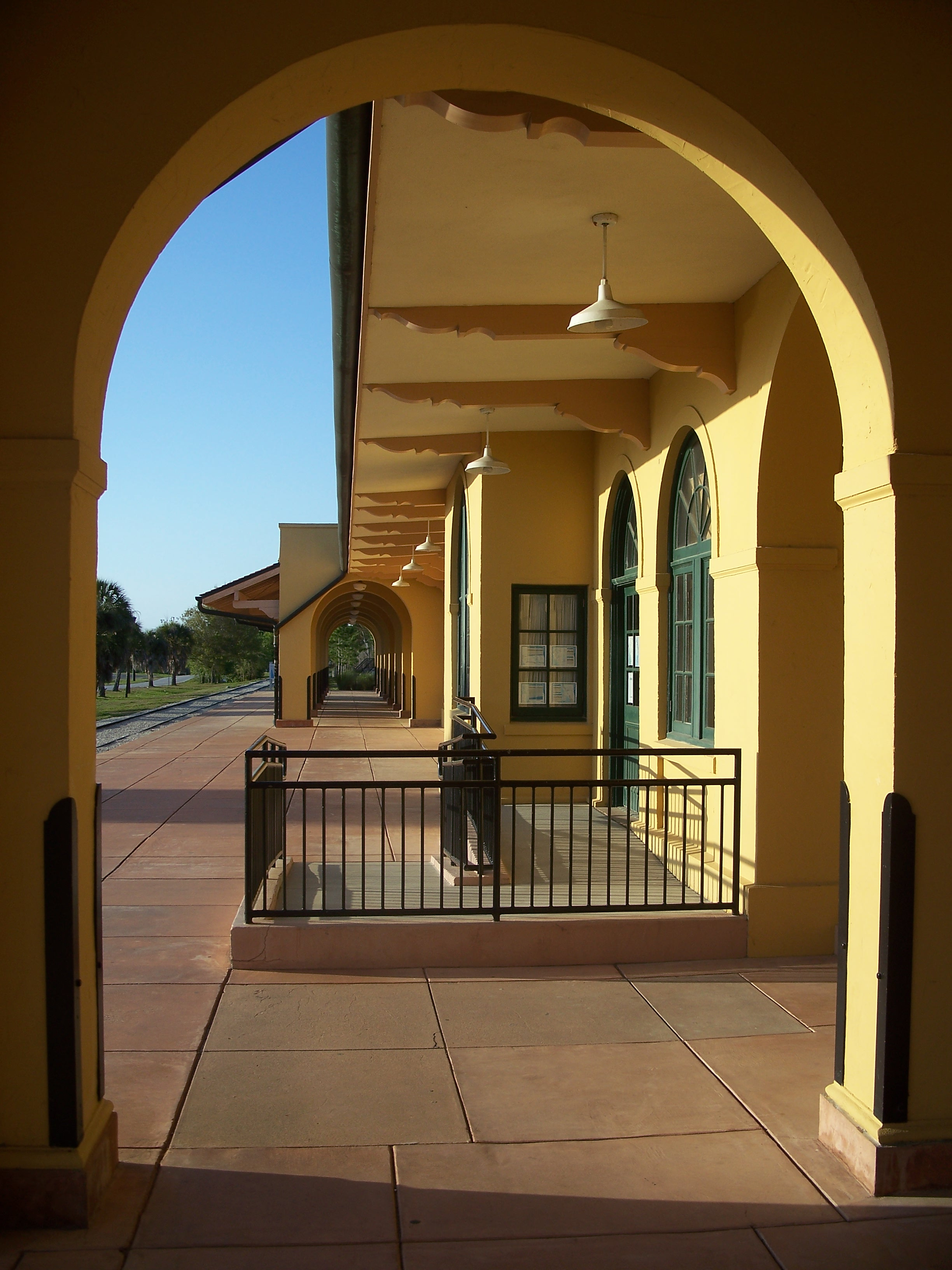 Venice, Florida: Venice Depot